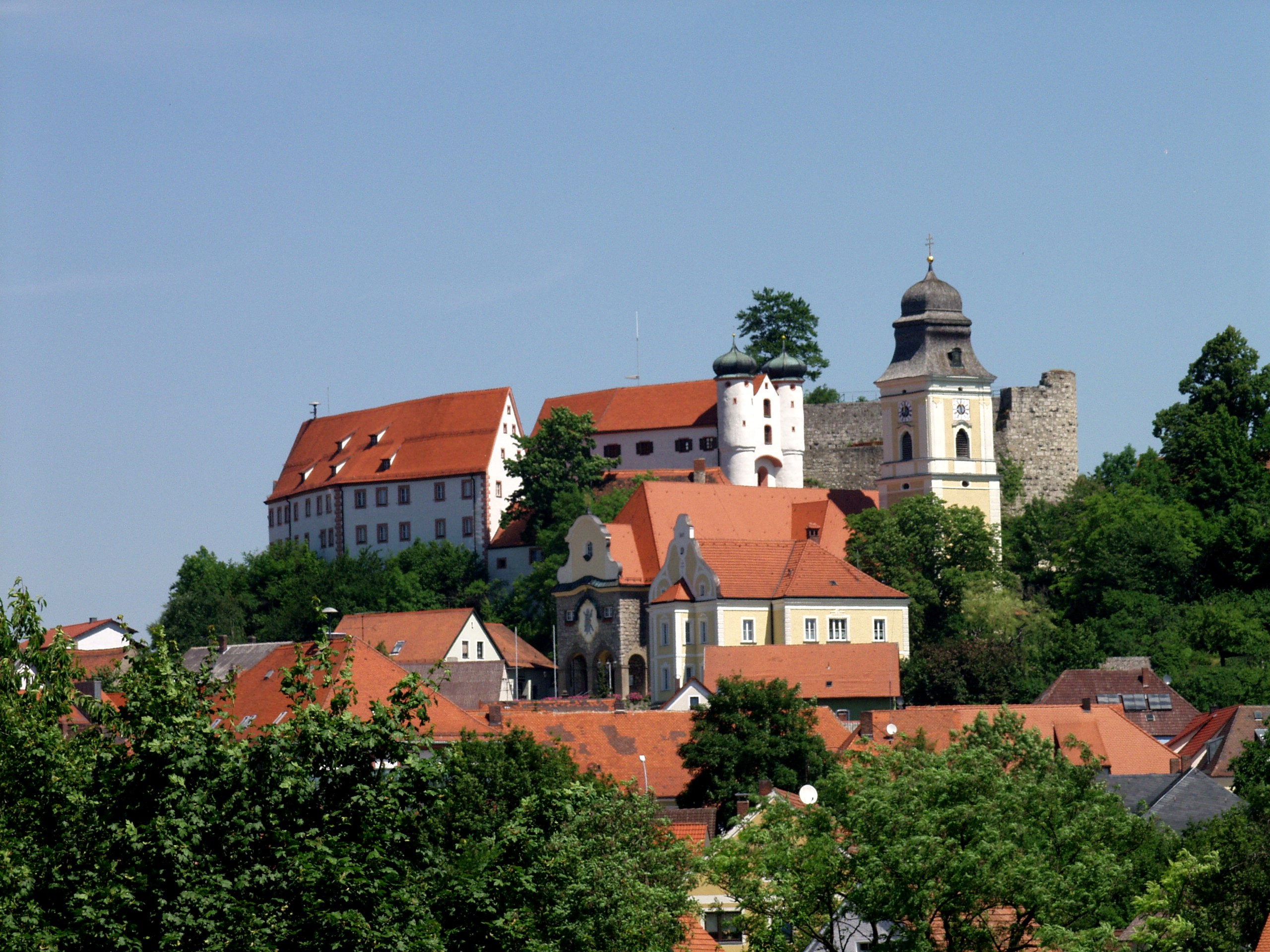 Ortsansicht Parsberg i.d. Oberpfalz, Burg, Kirche, Pfarrheim und Umgebung